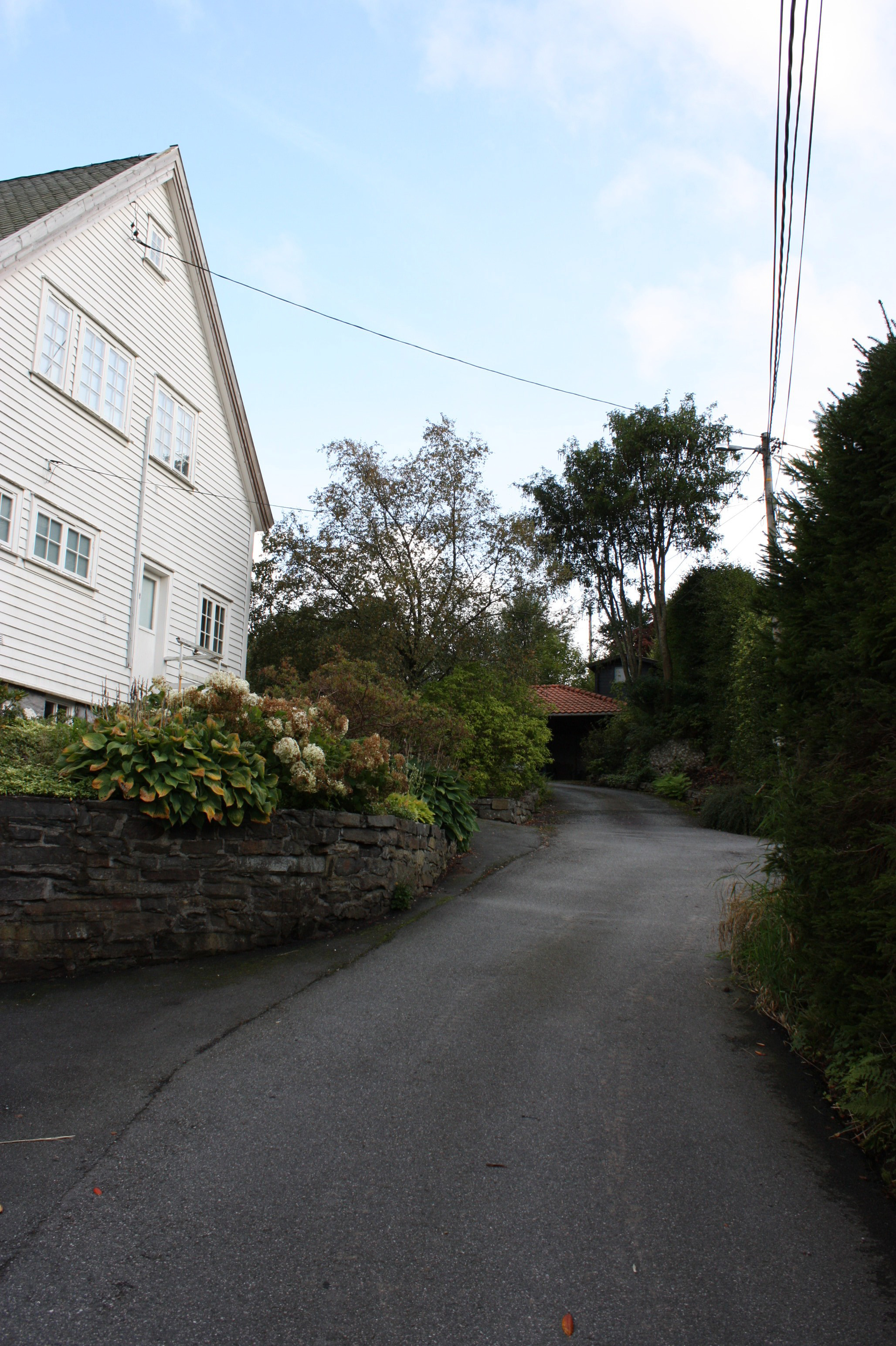 Hovdenlia, Fana, Bergen.